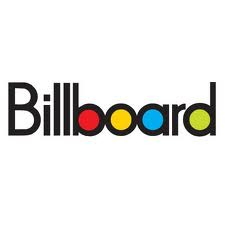 Tony en #1